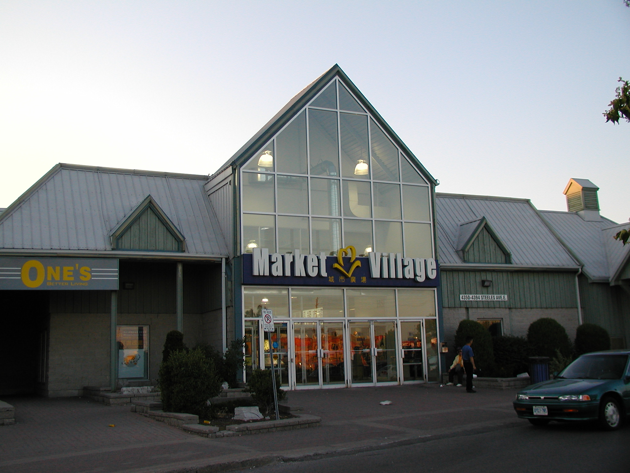 Market Village,Markham, Ontario